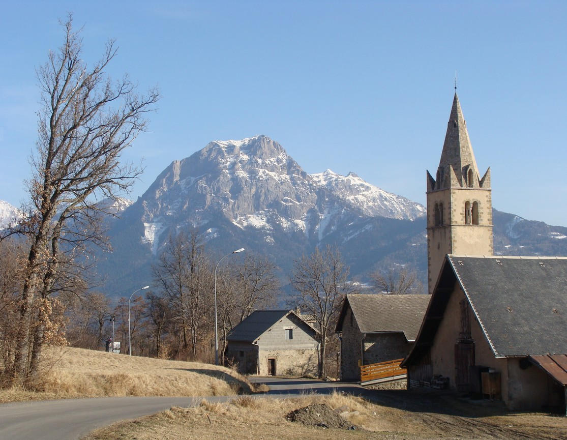 Prunières (Hautes-Alpes) : le quartier de l'église vu du nord-est. Au fond, le Grand-Morgon.